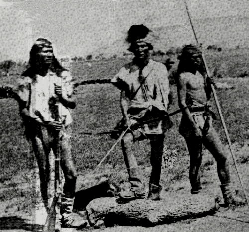 Fotografia de los indios tobosos de Coahuila.